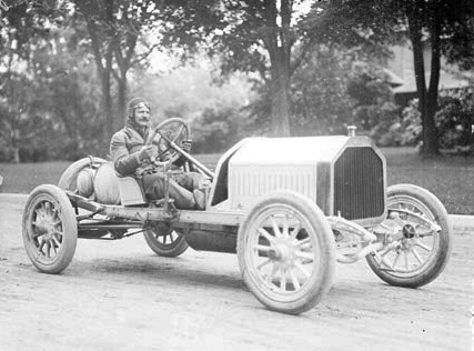 De Louis Chevrolet 1909 op engem Buick zu Crown Point am Indiana an der Cobe-Cup Course.